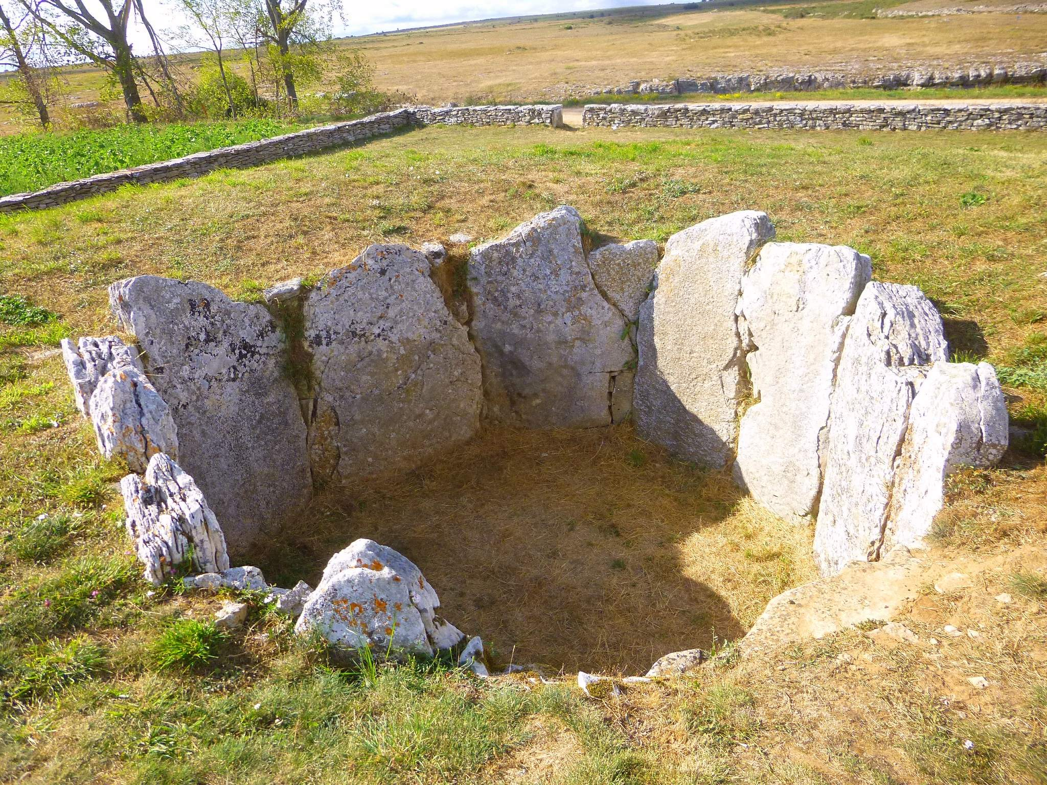 Sargentes de la Lora (Burgos) - Dólmen de la Cabaña